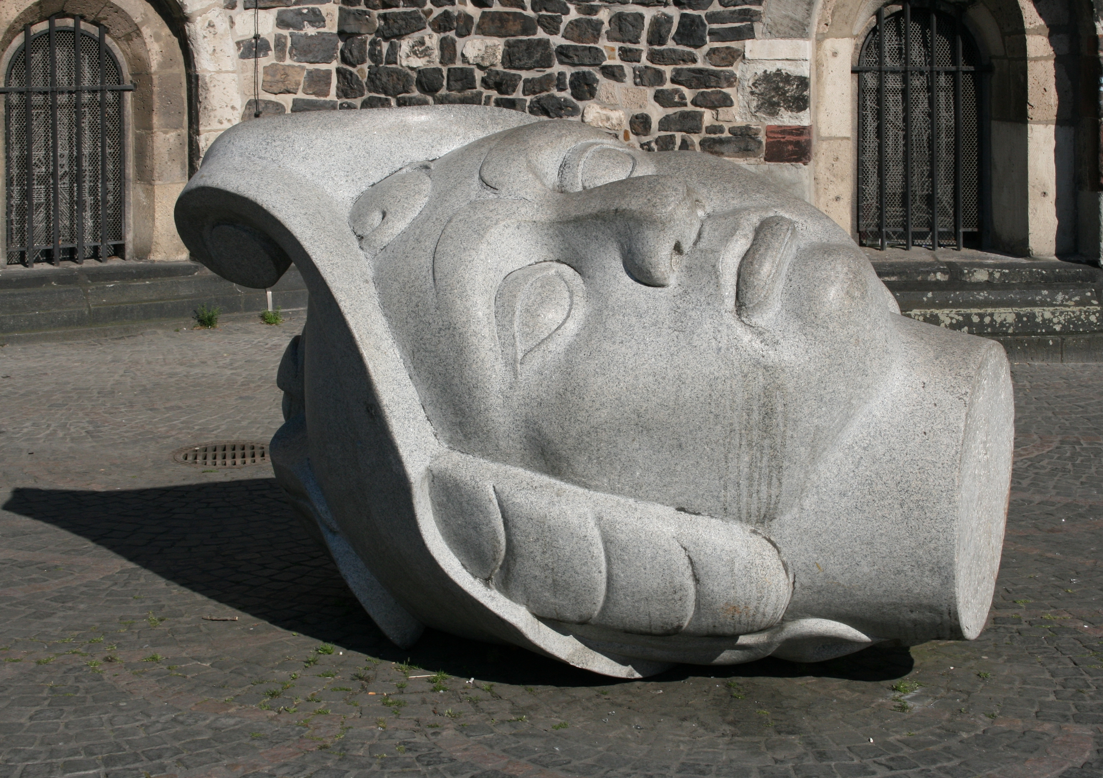 Cassius; Stadtpatron von Bonn Plastik vor dem Bonner Münster